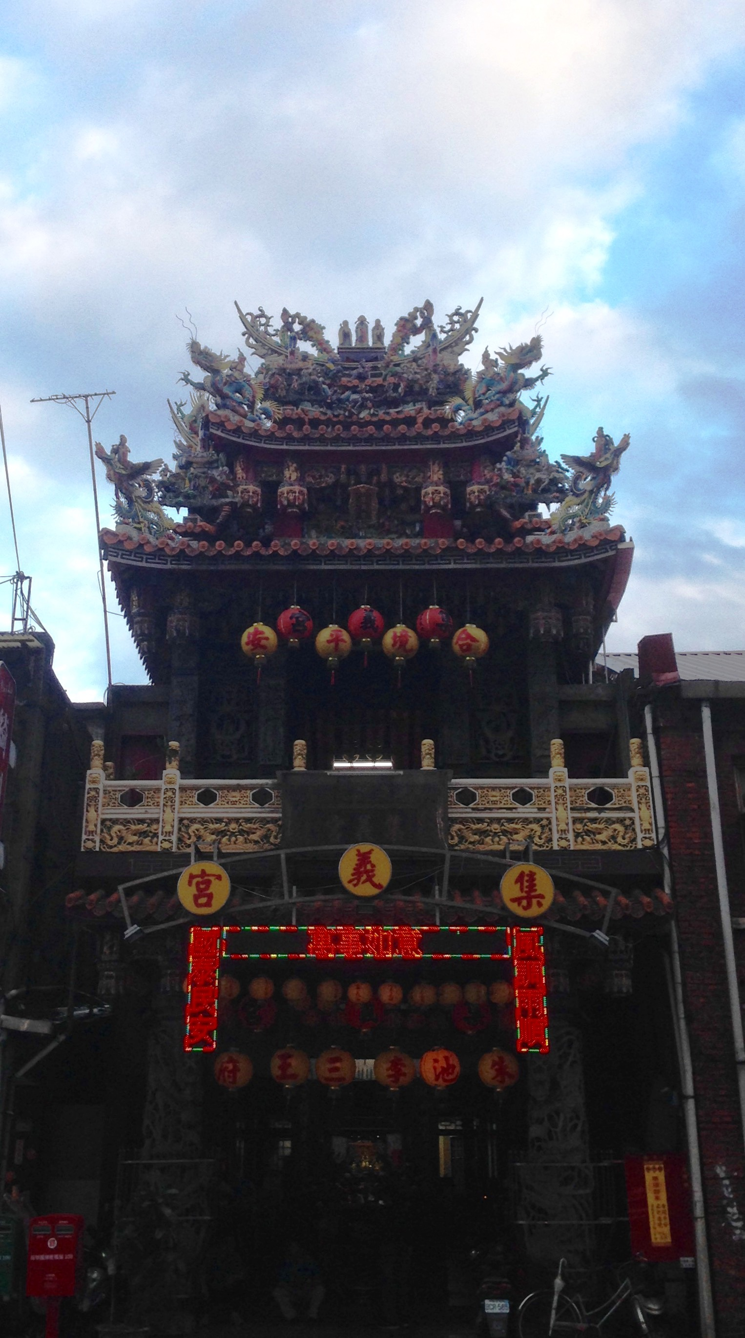 萬華集義宮